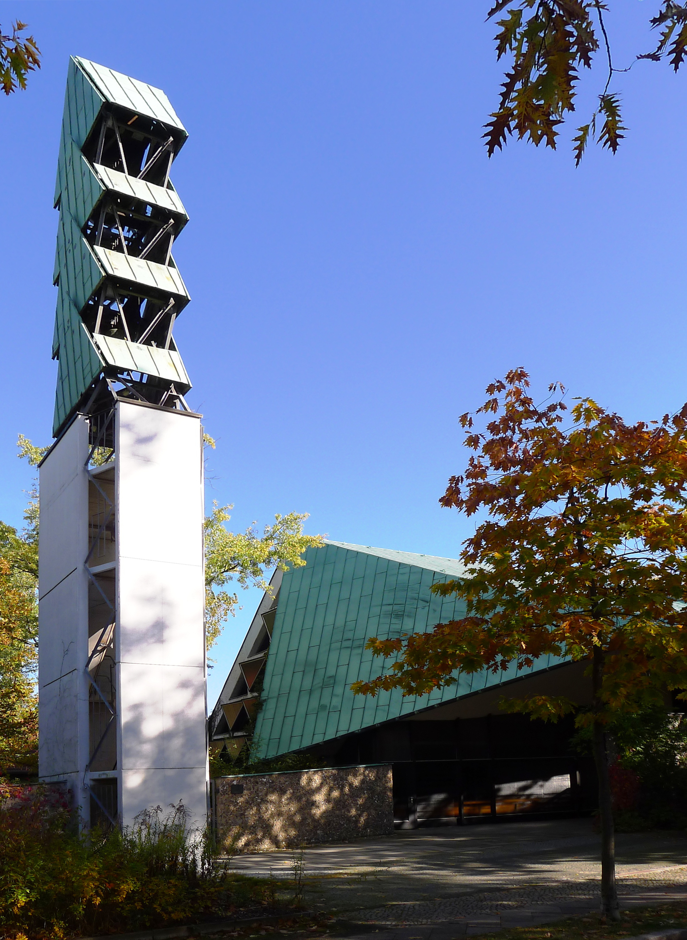 Blick auf die Kirche von der Eichenallee